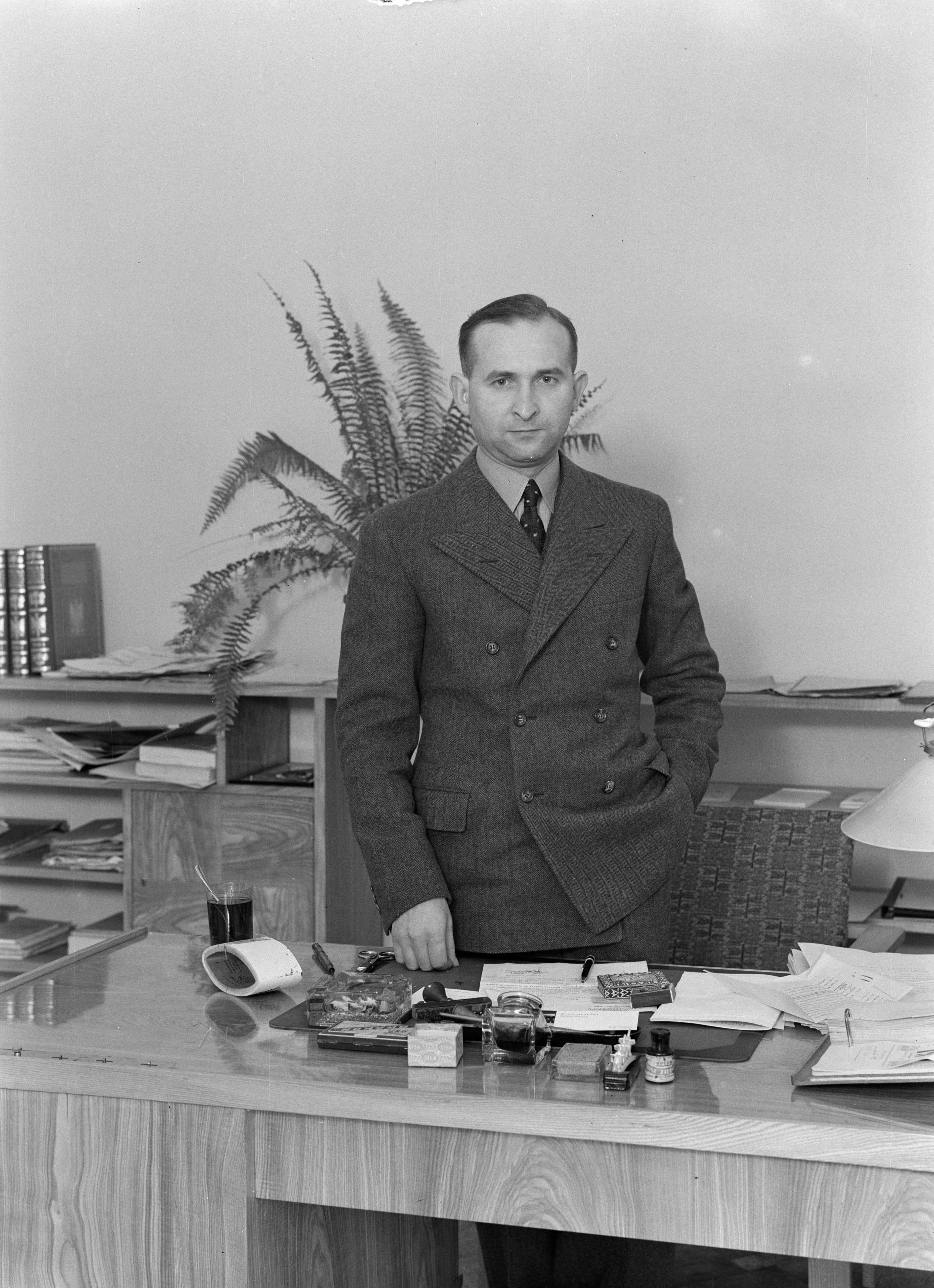 Collectie / Archief : Fotocollectie Van de Poll Reportage / Serie : Reis naar Polen Beschrijving : MieczysÅ‚aw Obarski, hoofdredacteur van Polska AgencjaTelegraficzna ( PAT) staande achter zijn bureau Annotatie : Het PAT, opgericht in 1918, was het persbureau van de republiek Polen en tevens het enige in dat land Datum : 1934 Locatie : Polen, Warschau Trefwoorden : nieuwsuitzendingen, pers, redacteuren Persoonsnaam : Obarski, MieczysÅ‚aw Fotograaf : Poll, Willem van de Auteursrechthebbende : Nationaal Archief Materiaalsoort : Glasnegatief Nummer archiefinventaris : bekijk toegang 2.24.14.02 Bestanddeelnummer : 190-1256